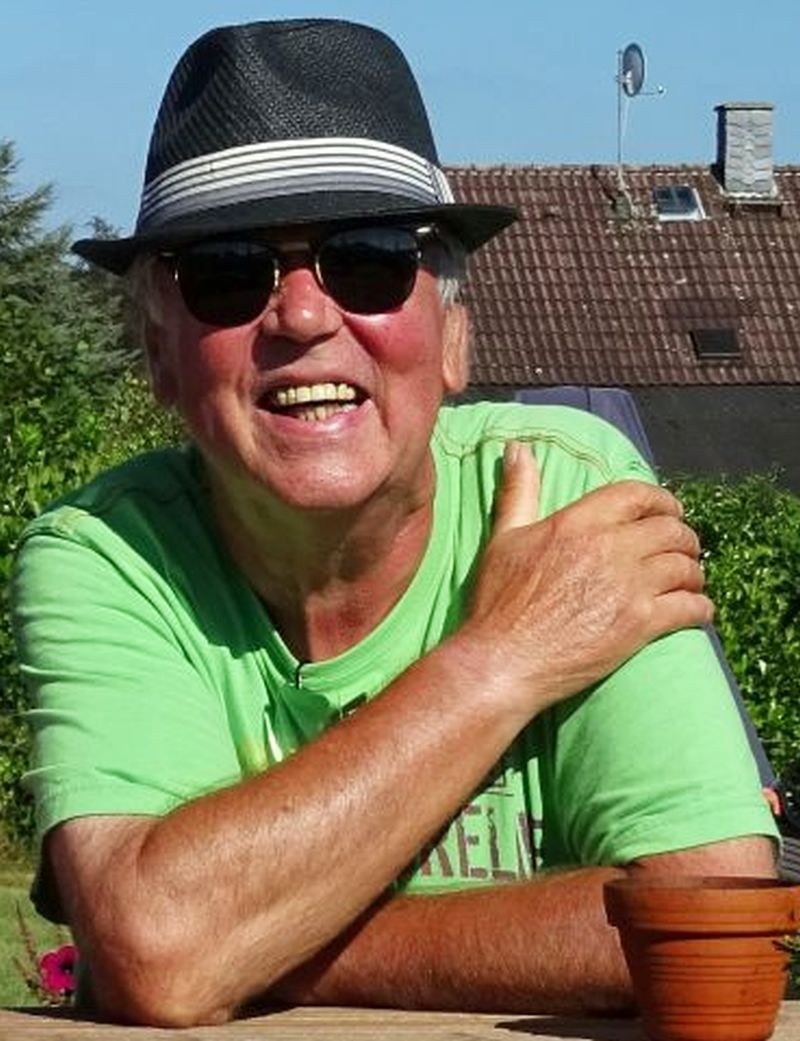 Frank Laufenberg